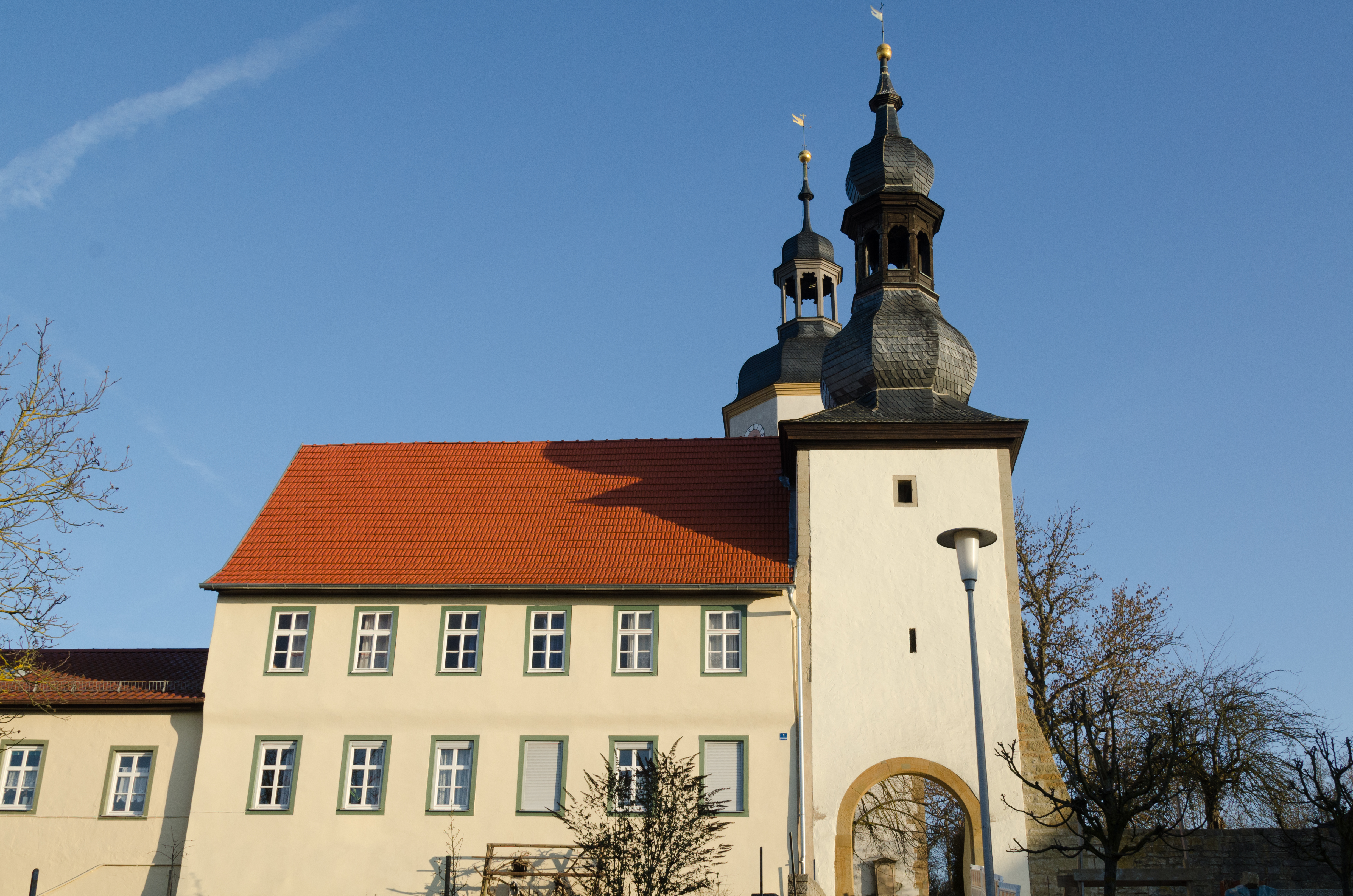 Aubstadt, Kirchenrangen 1